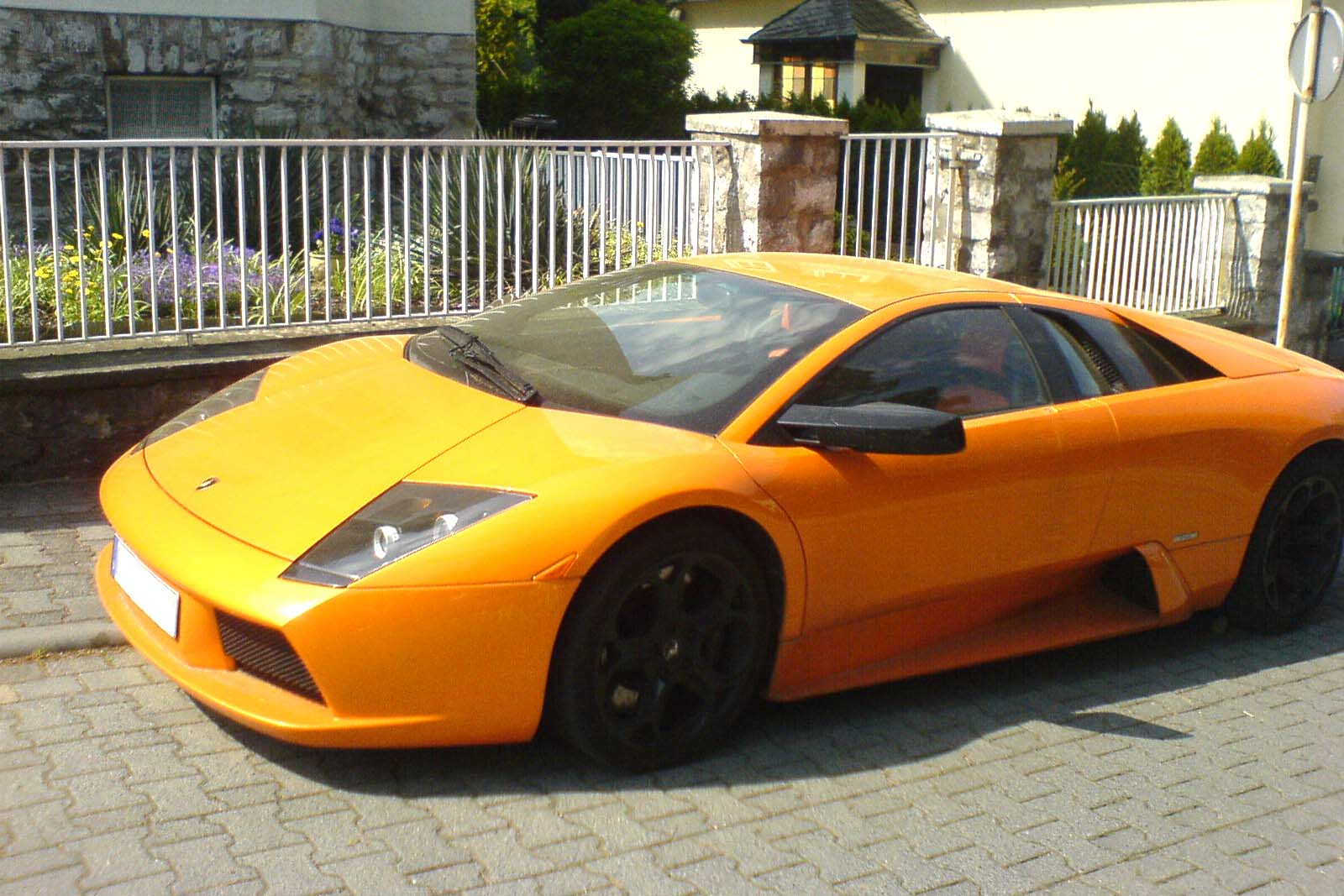 Lamborghini Murciélago